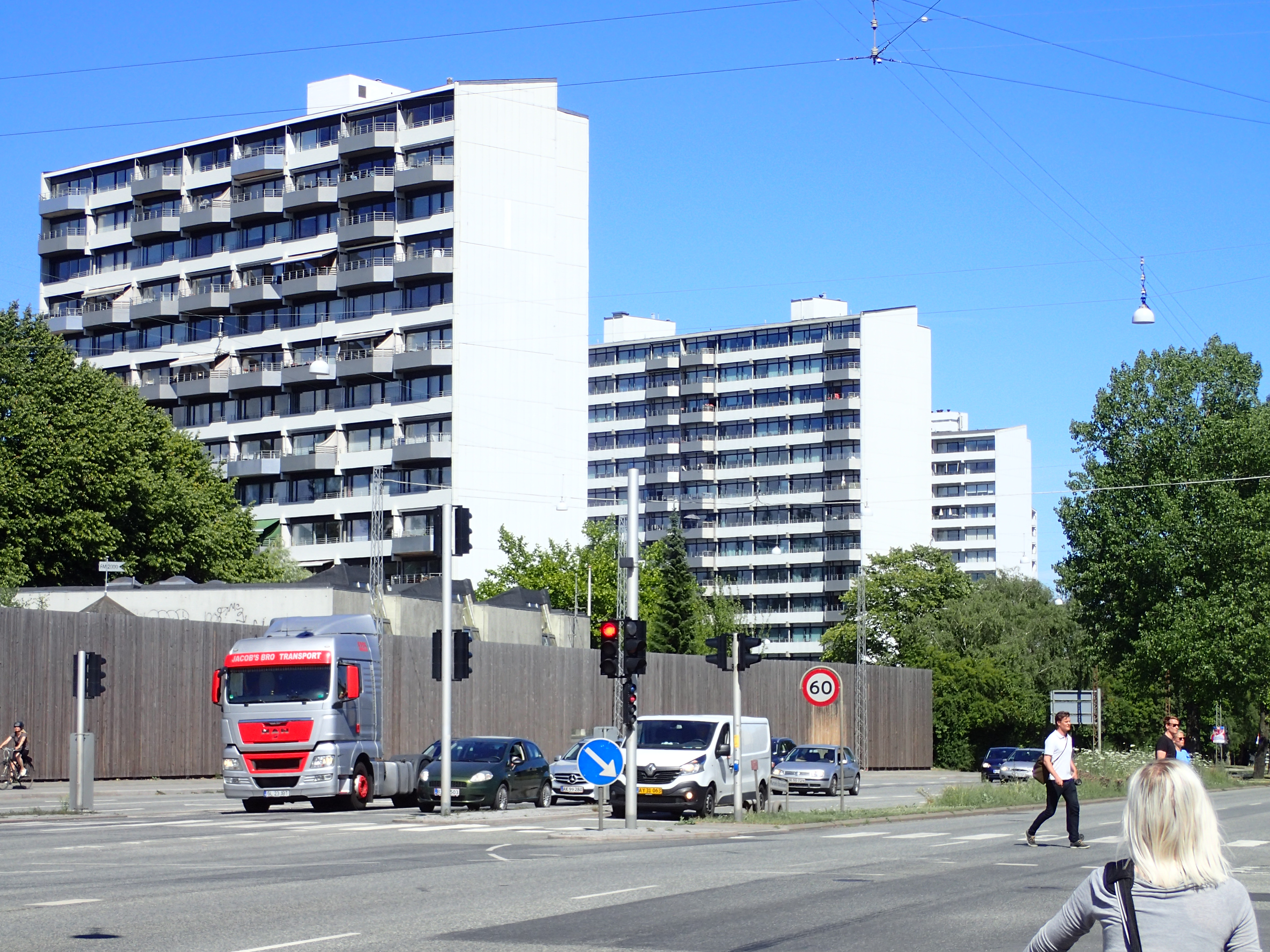 Marselis Boulevard med udsigt til Højhusene Marselis Boulevard.